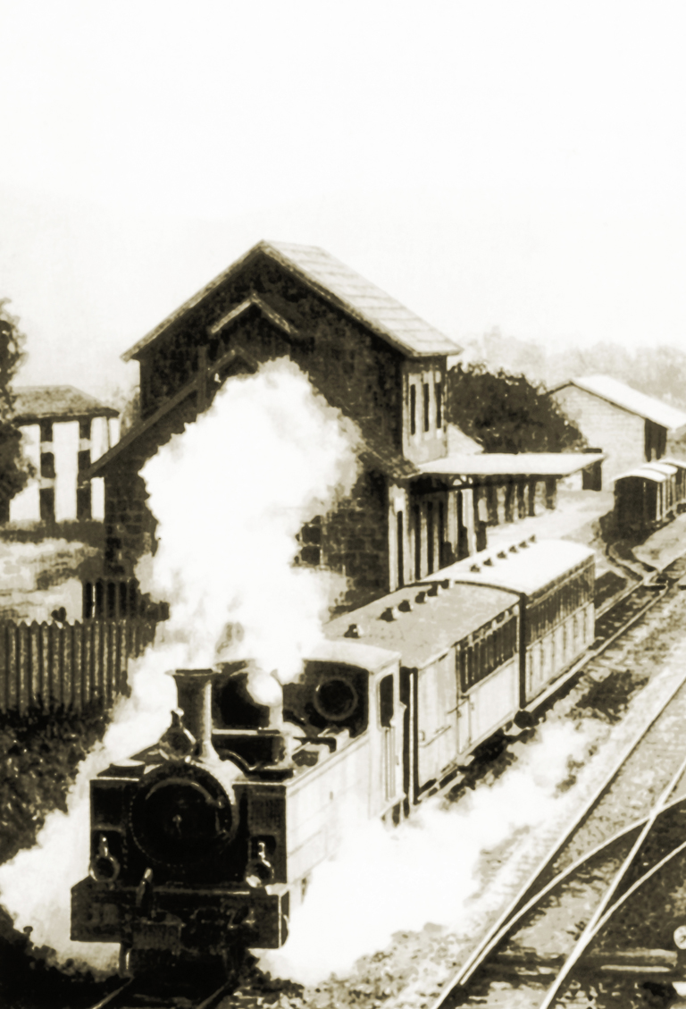 Lehen lurrun lokomotorra 1905ean iritsi zen Elorriora